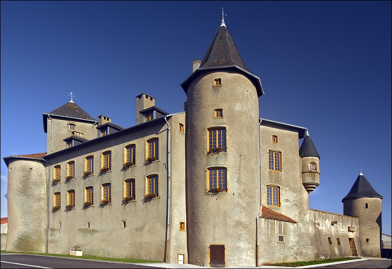 Château de Luttange